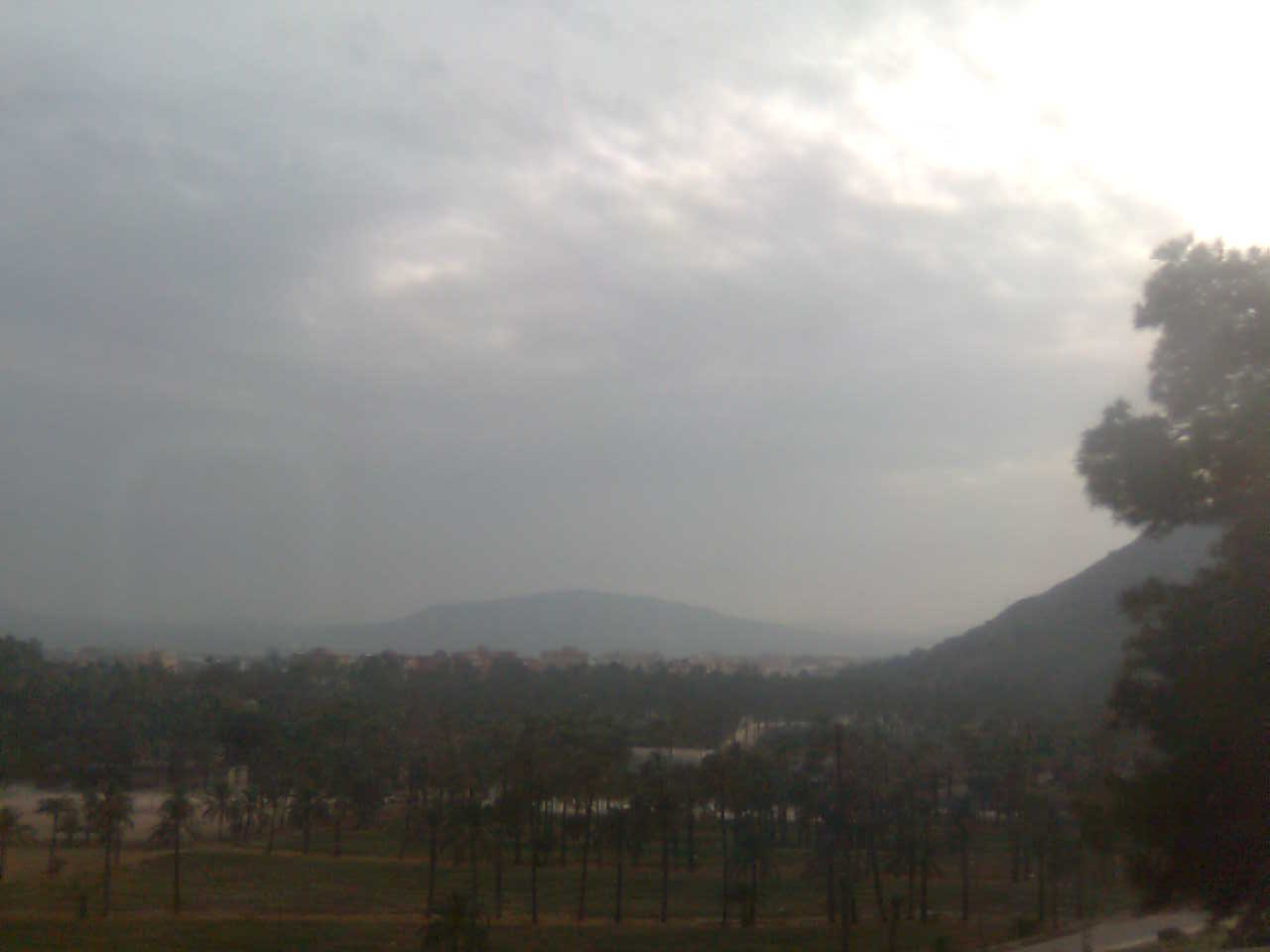 Palmeral de Orihuela, desde la carretera nacional